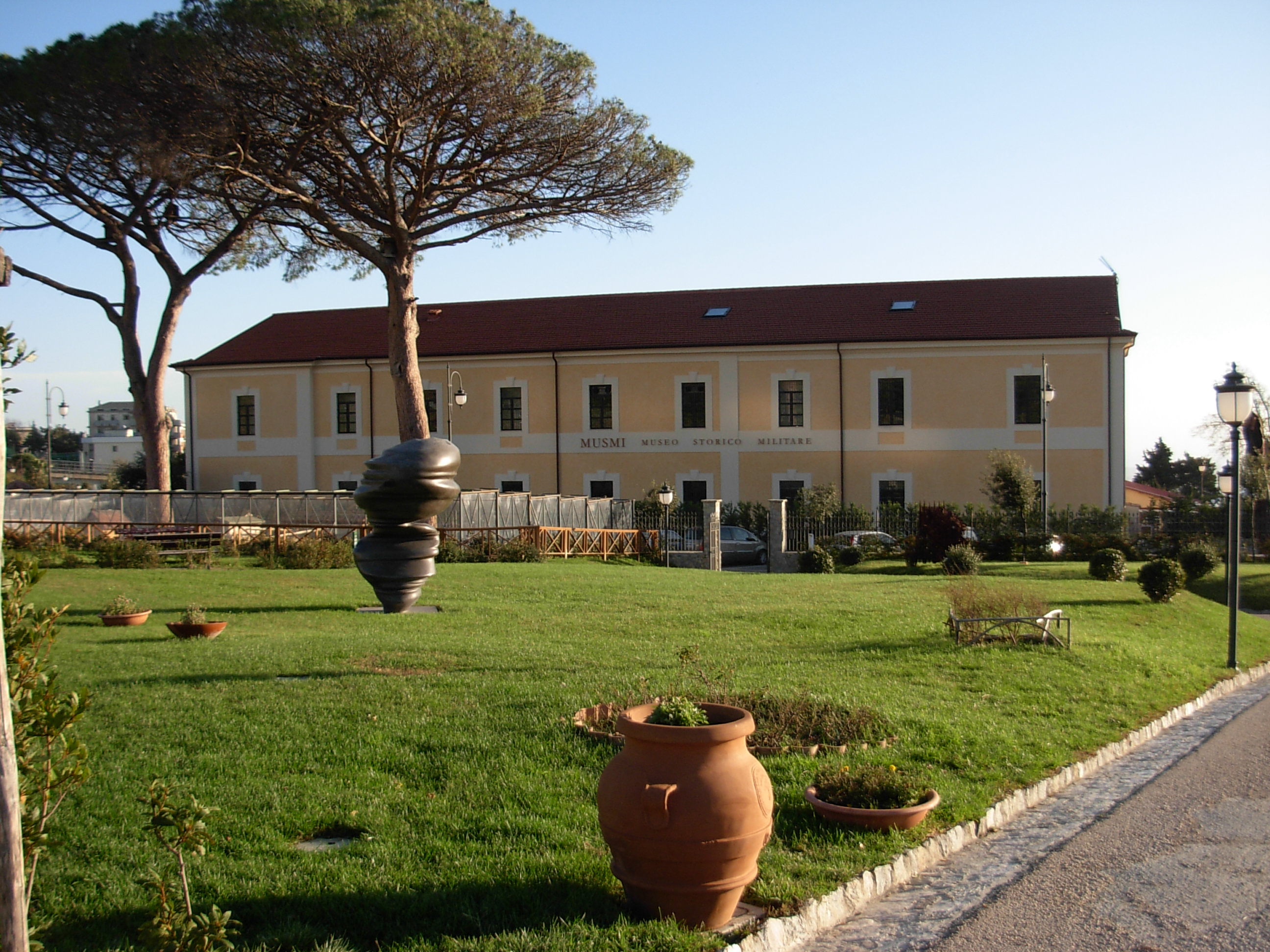 Parco delle Biodiversità